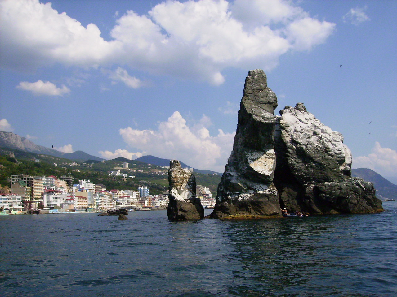 Скалы "Три сестры" возле поселка Утес (АР Крым, Украина)